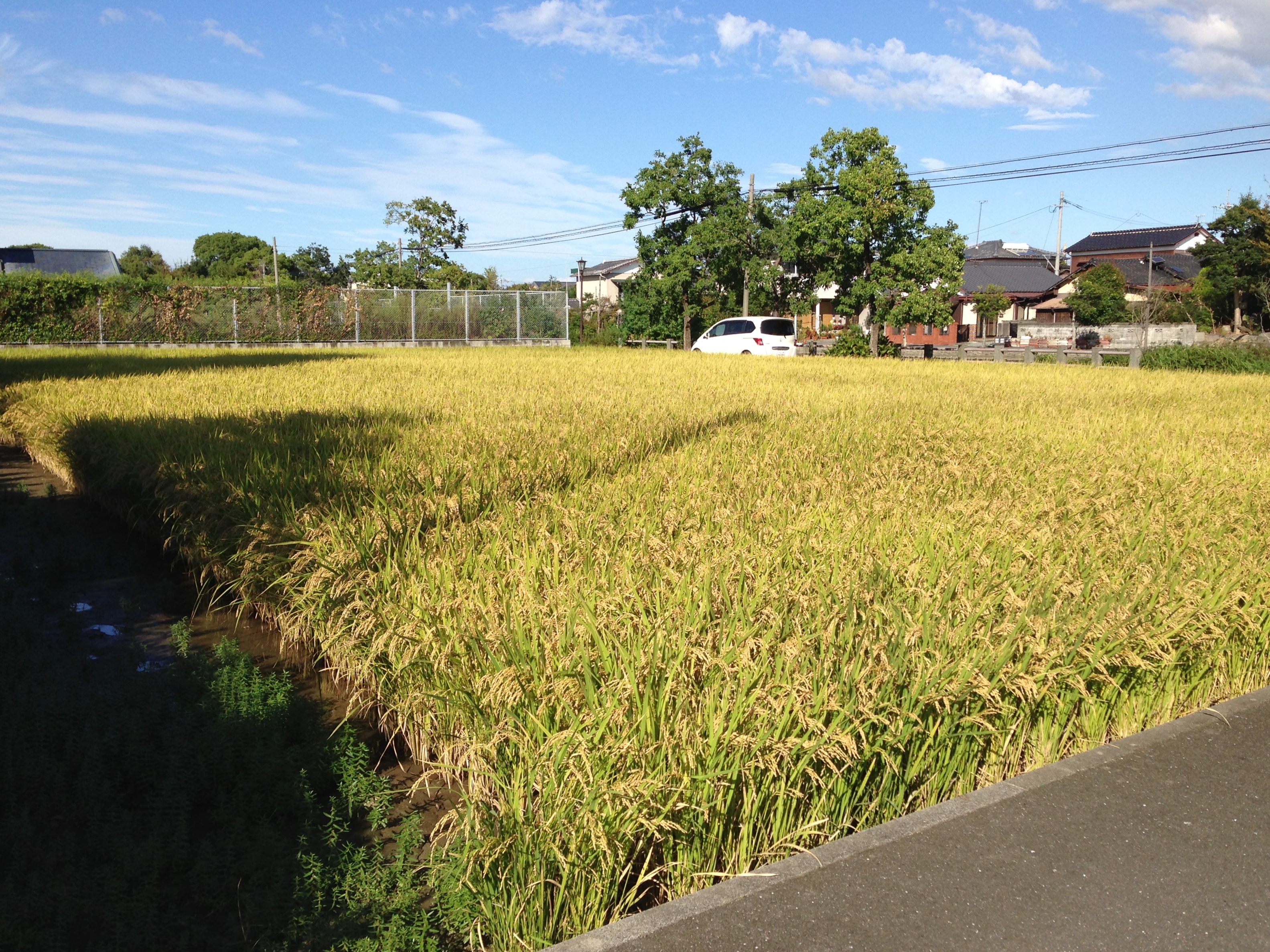 柳川市の田んぼ・実る稲穂